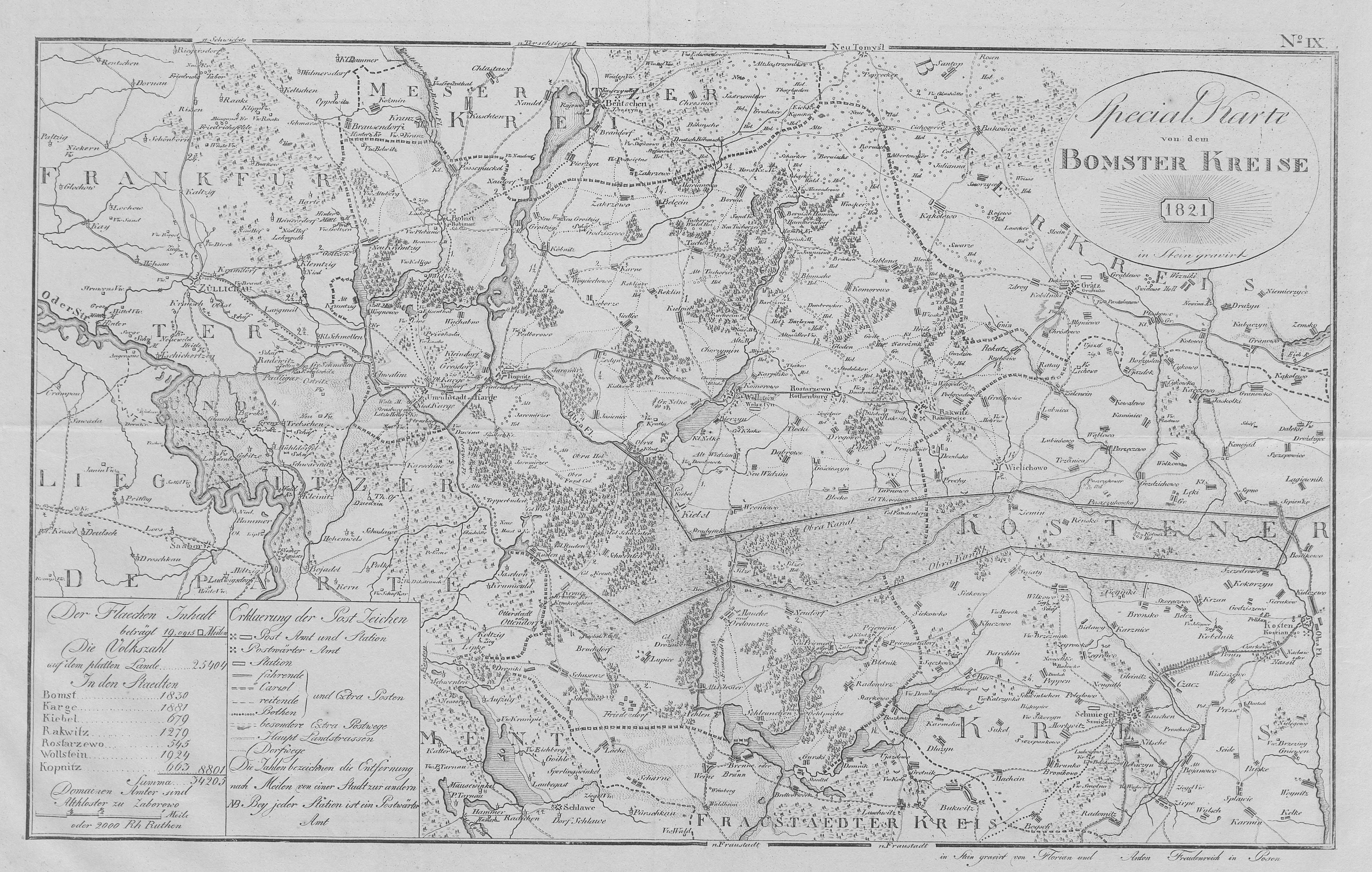 Kreis Bomst as from 1818 to 1887